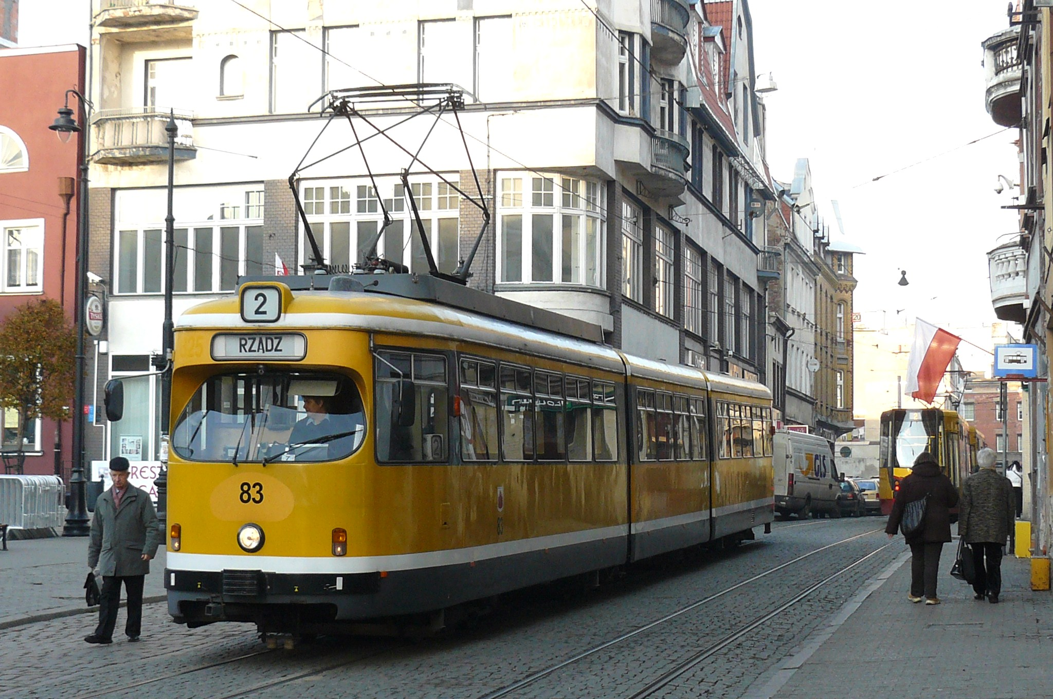 Tram GT8, Grudziądz, Rynek. 10.11.2011.